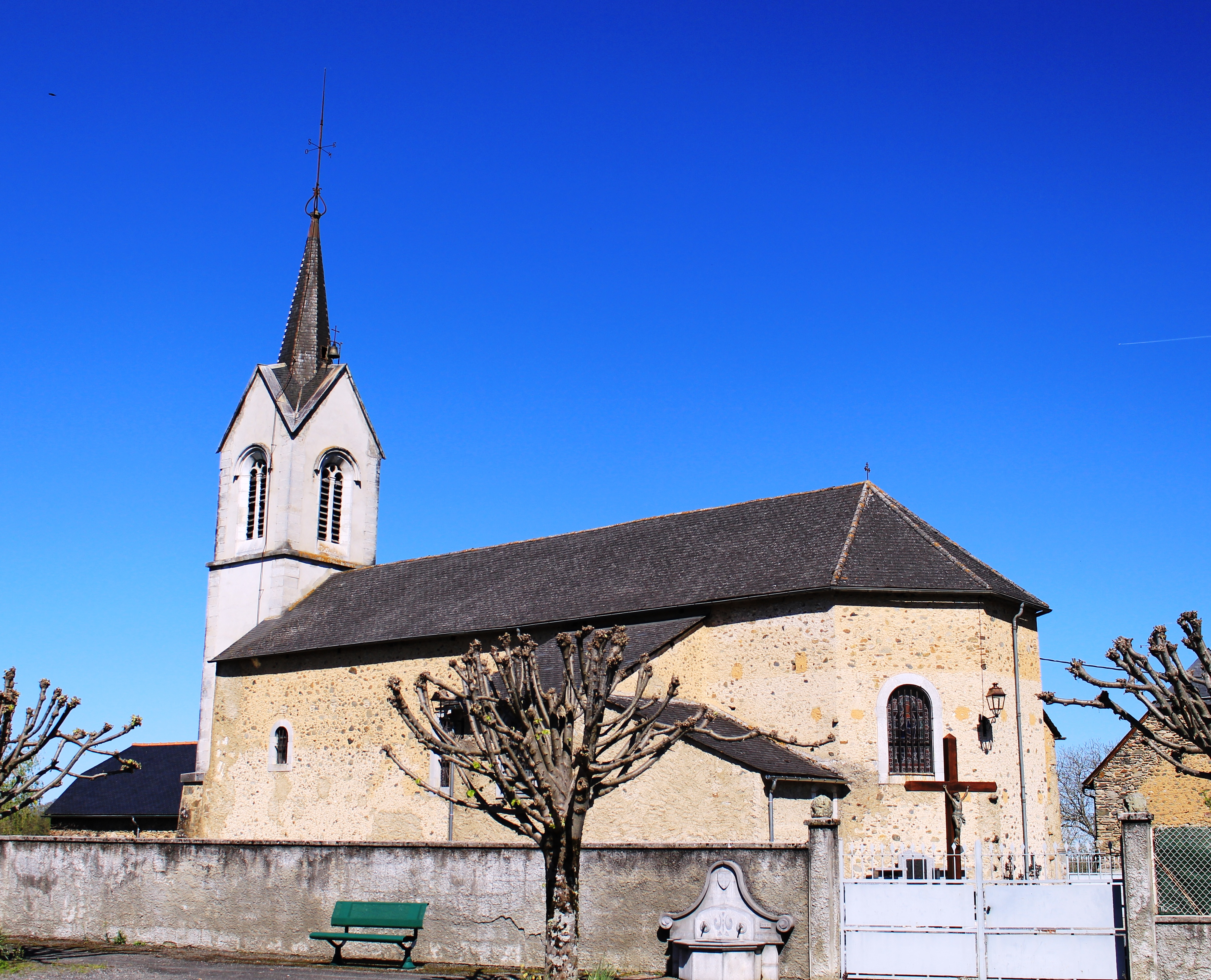 Église Saint-Martin de Barlest (Hautes-Pyrénées)